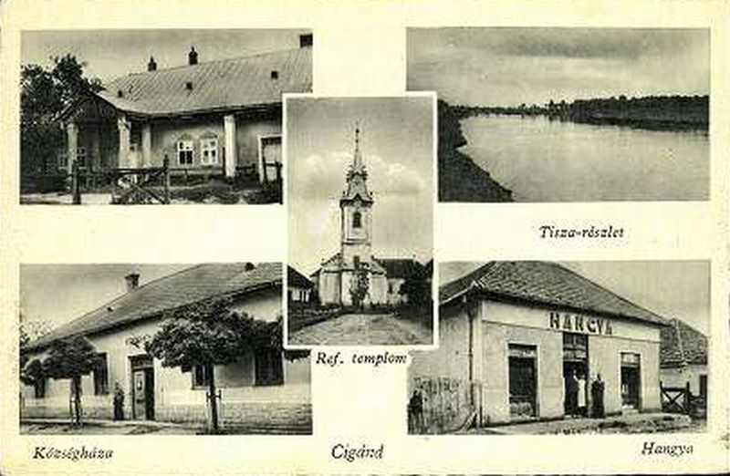 Régi cigándi képeslap.